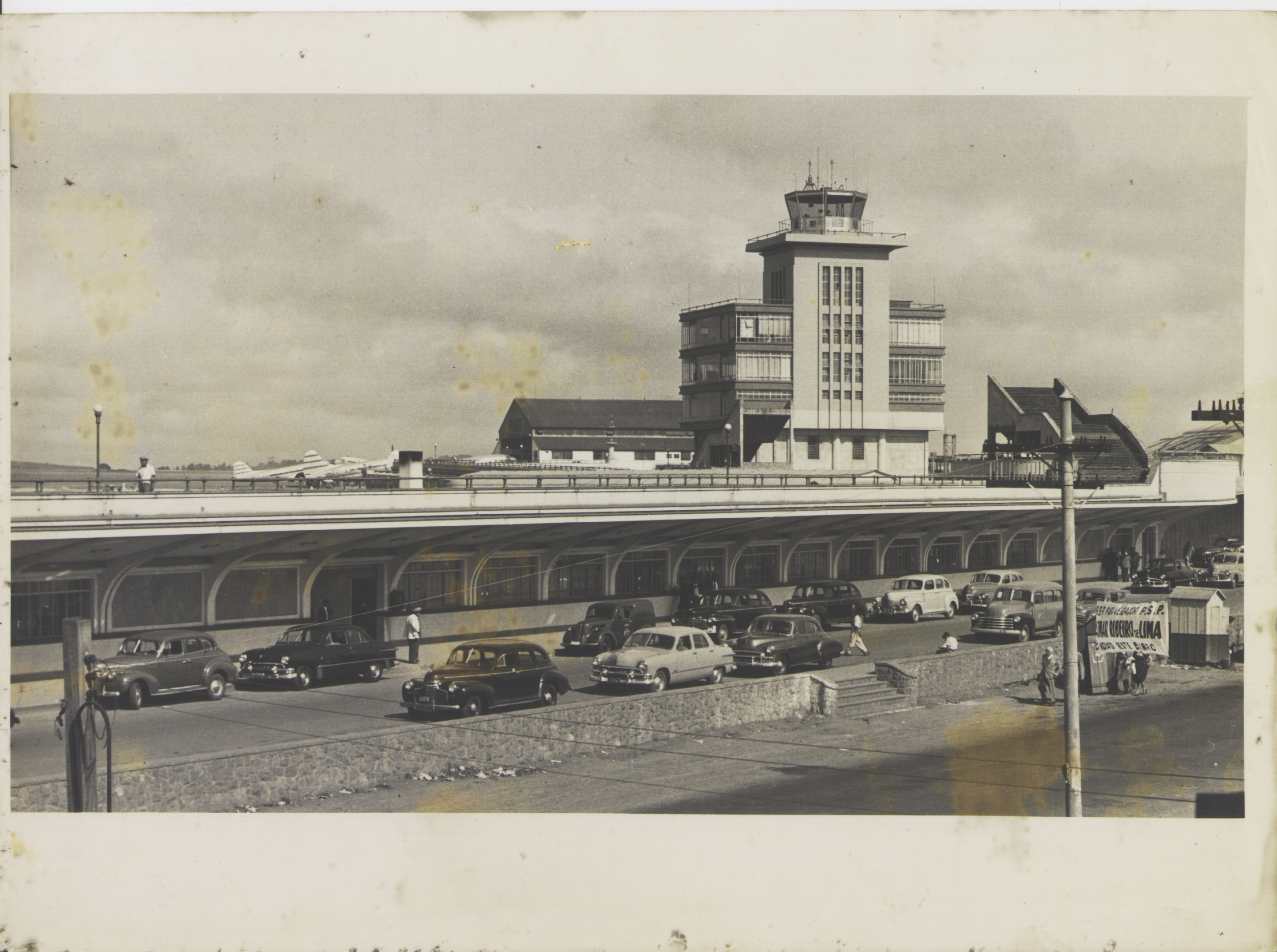 Obra que integra o acervo do Museu Paulista da USP. Coleção Werner Haberkorn